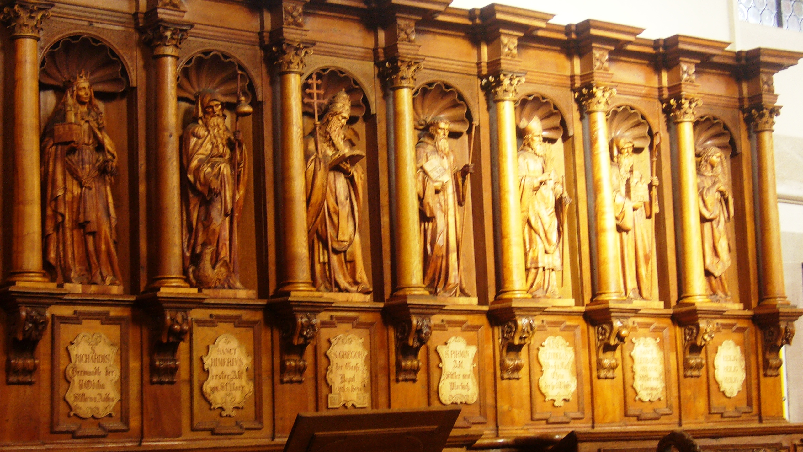 Ebersmunster 012.JPG